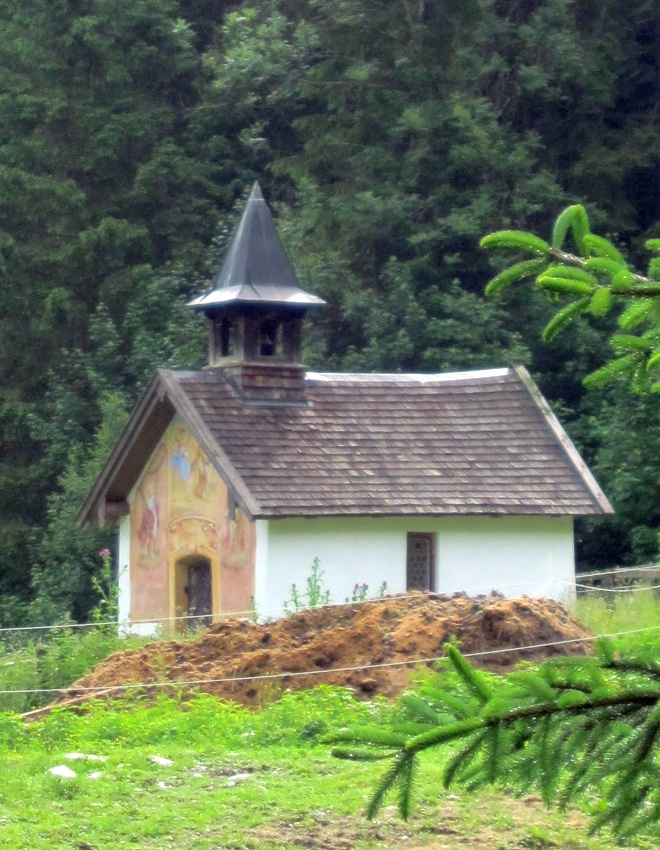 Die Kapelle Elmau in 82493 Krün, fotografiert vom Schachenweg aus